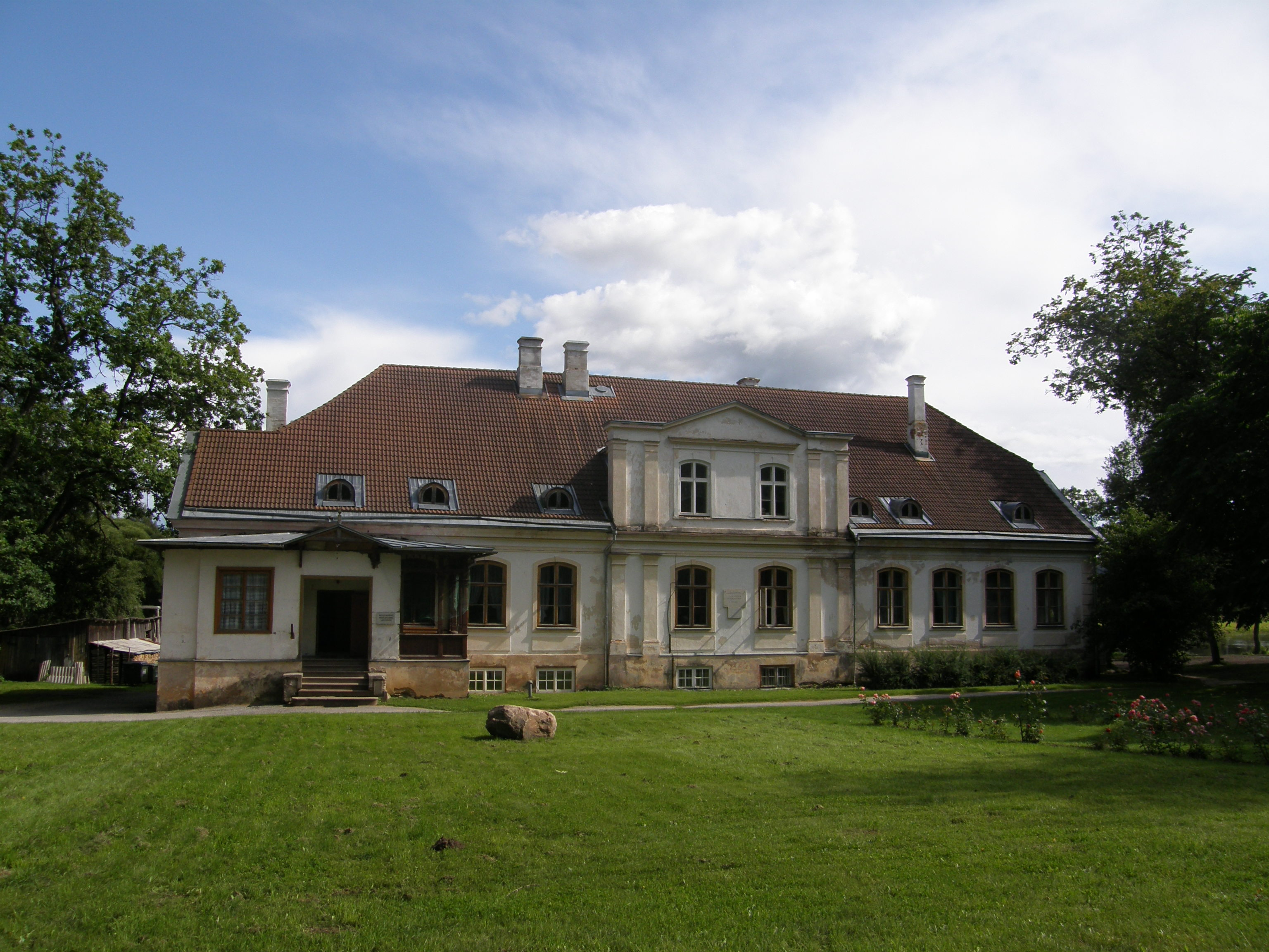 Hellenurme mõisa peahoone.